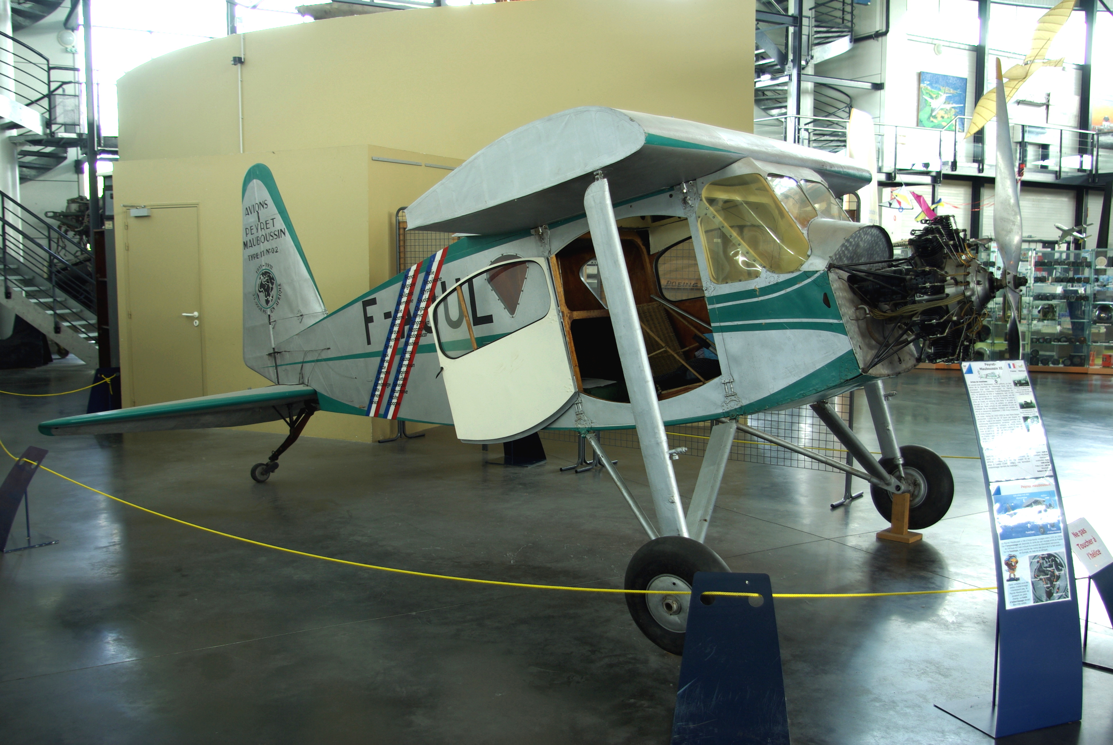 Peyret Mauboussin Type 11 présenté à l'Espace Air Passion à Angers.